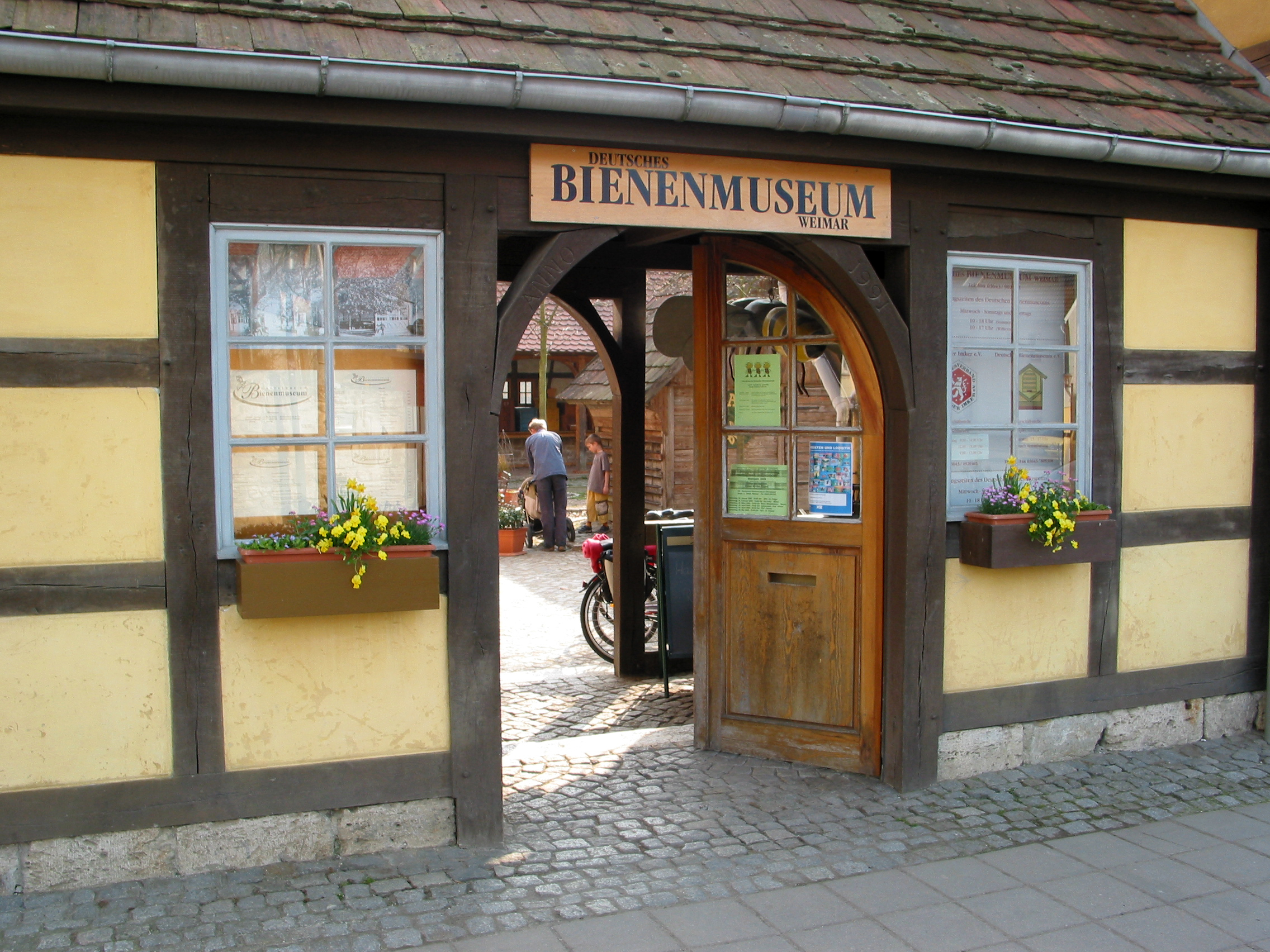 Eingang des Deutschen Bienenmuseums in Weimar.